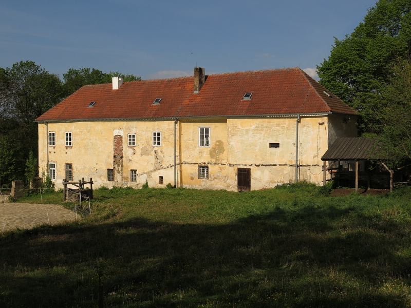 Fara, Černice 1, Černice (Mojné).